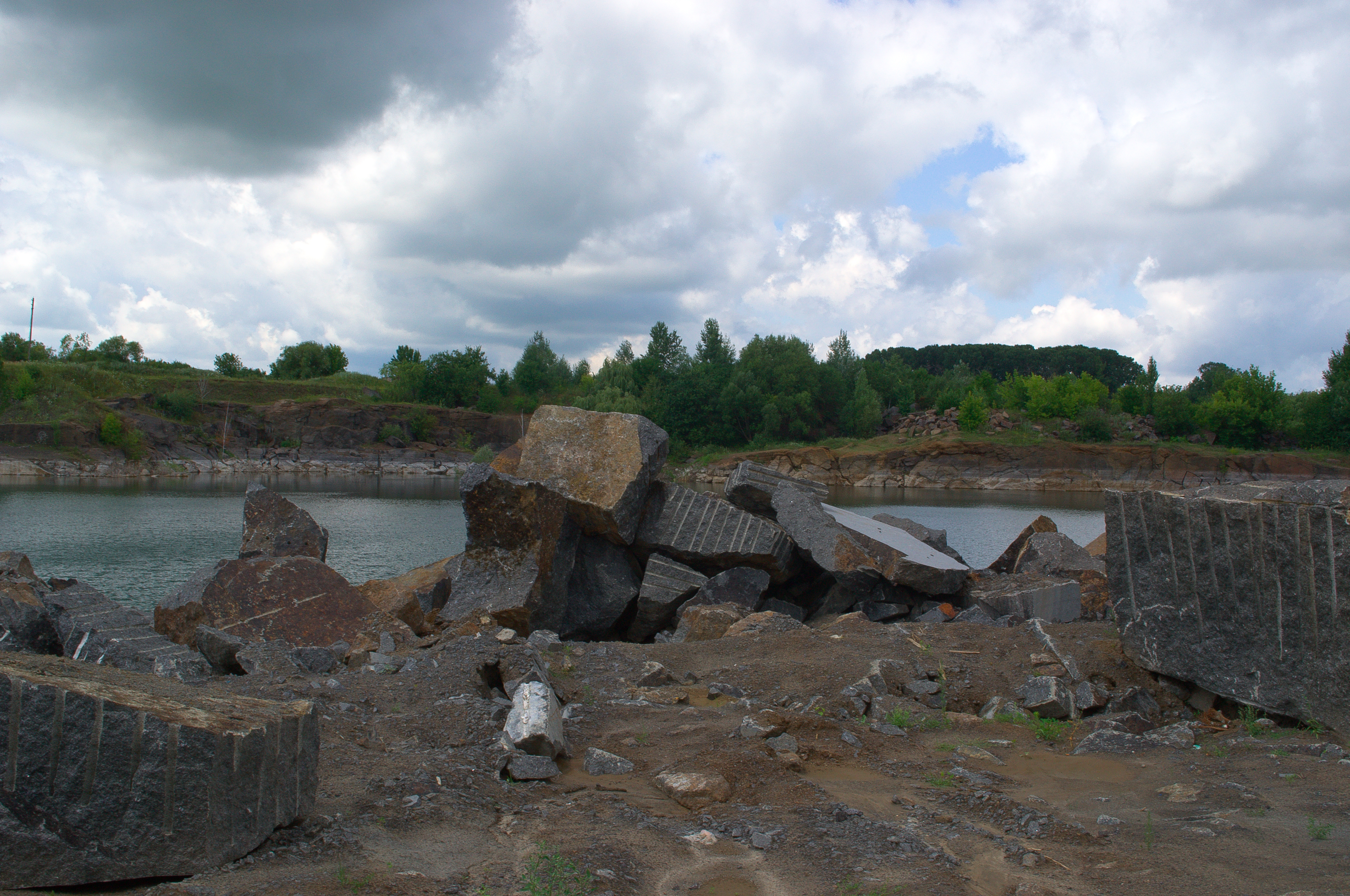 Відслонення іризуючого лабрадориту, Черняхівський р-н, смт Головине, Головинський кар'єр